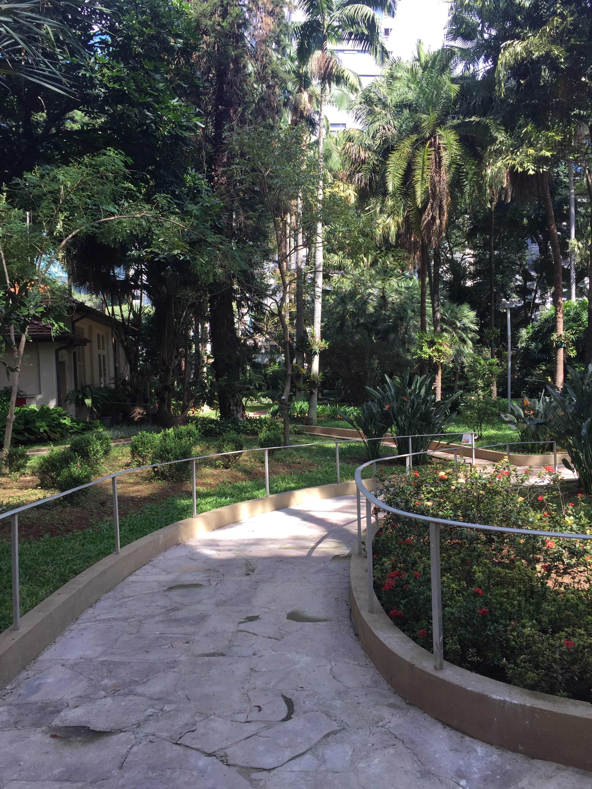 Jardim do Acervo Histórico Irmã Beata Heinrich, em São Paulo (SP), Brasil.